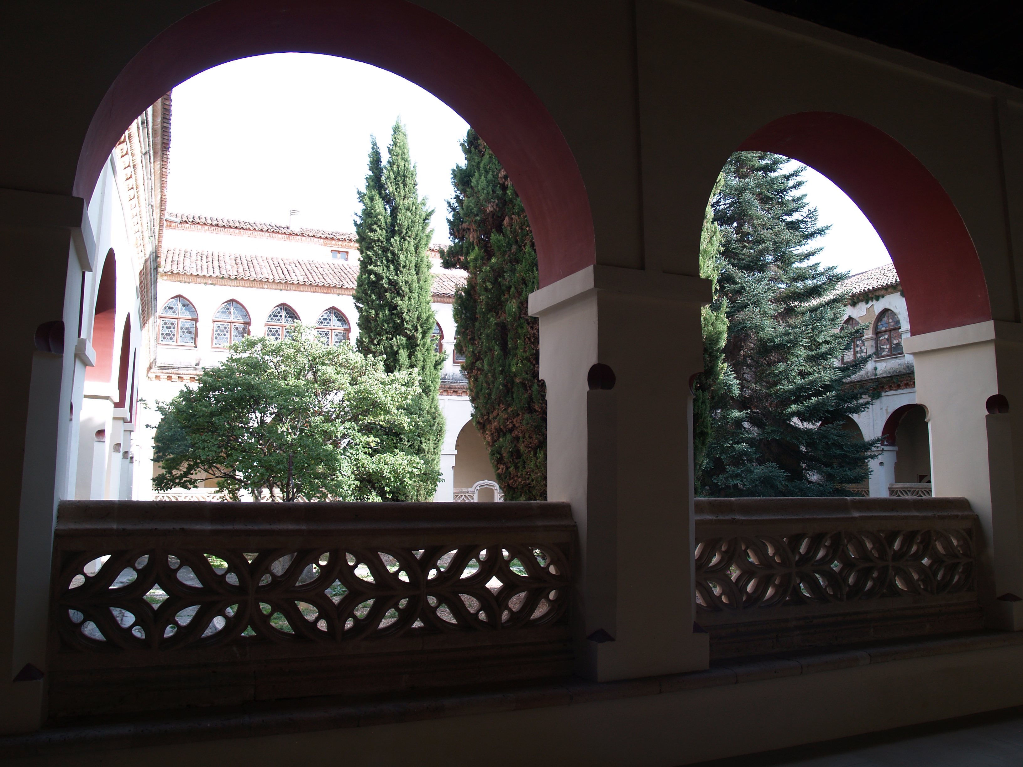 Monasterio del Parral (Segovia). Claustro grande. Santa Maria del Parral LocationSegovia, SpainCoordinates40° 57′ 21.7″ N, 4° 07′ 35.7″ W Established1447Authority control : Q1997245 VIAF: 236123145 BIC: RI-51-0000129 GND: 4645668-5 BNE: XX104503 JCyL: 11914 institution QS:P195,Q1997245